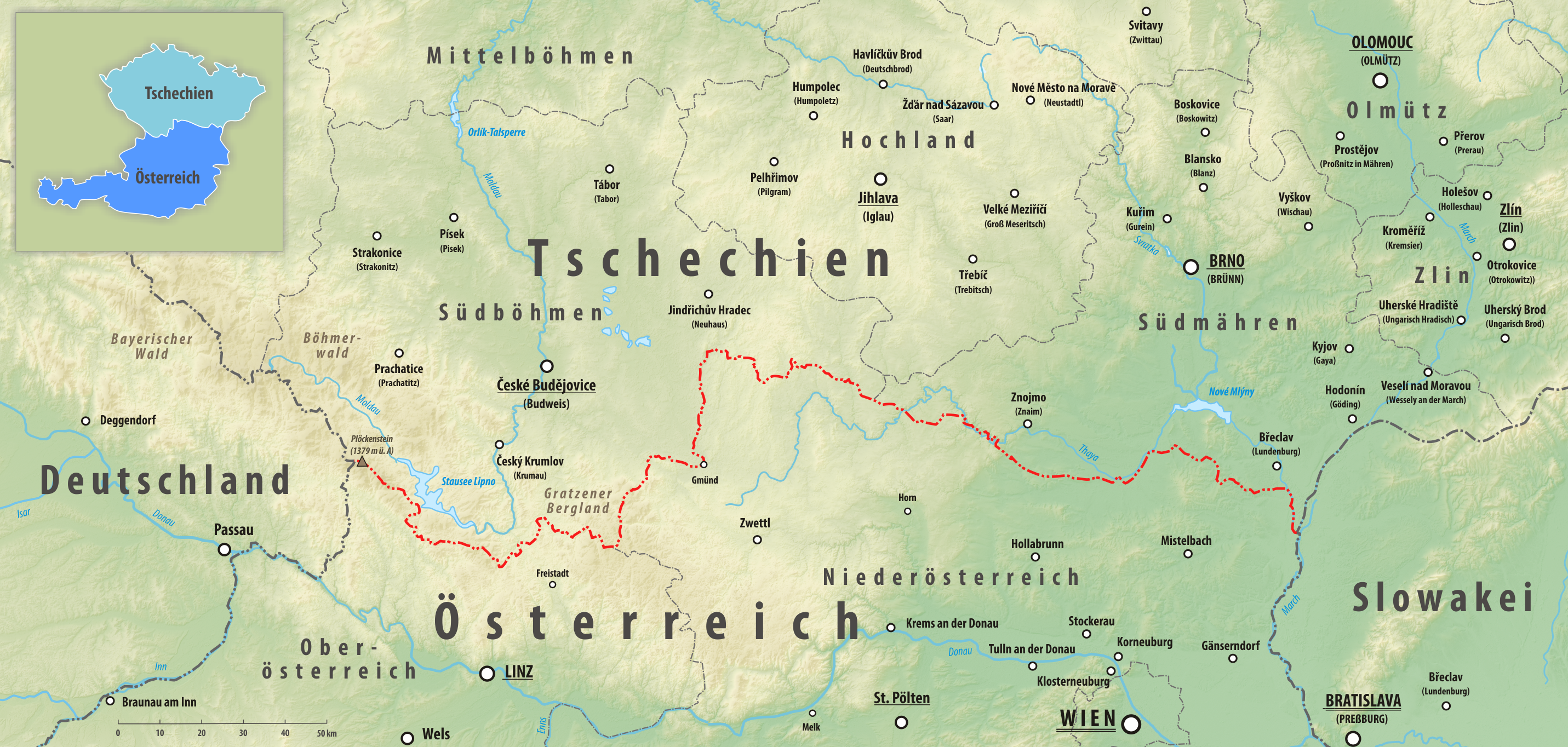 Reliefkarte des Grenzverlaufes zwischen Österreich und Tschechien Topographischer Hintergrund: NASA Shuttle Radar Topography Mission (public domain). SRTM3 v.2.